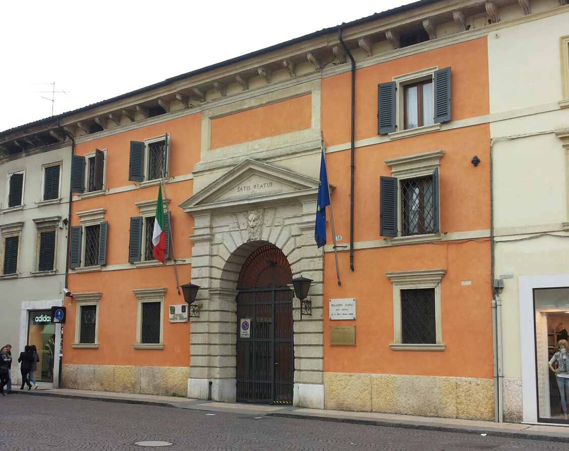 Facciata del Palazzo Carli a Verona.